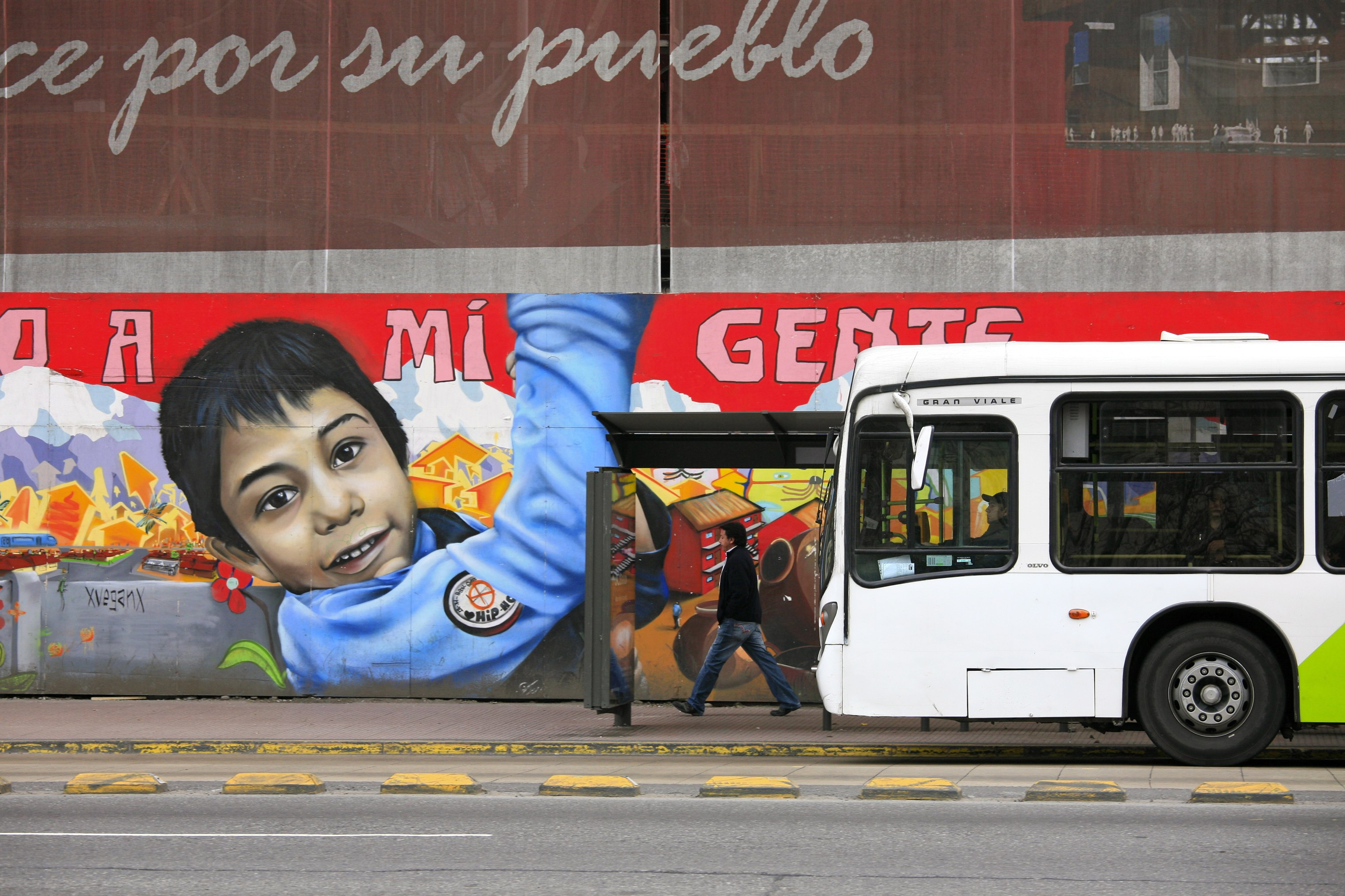 Santiago Chile